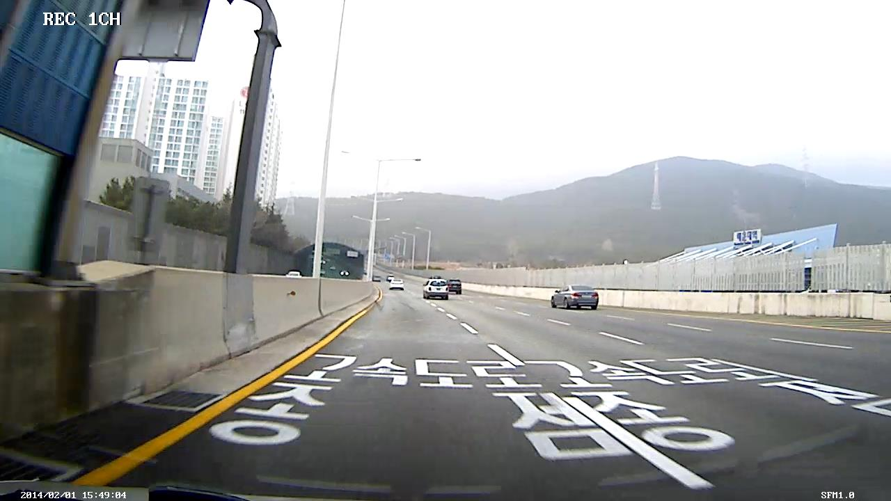 동해고속도로 시점(장산로입구)입니다.